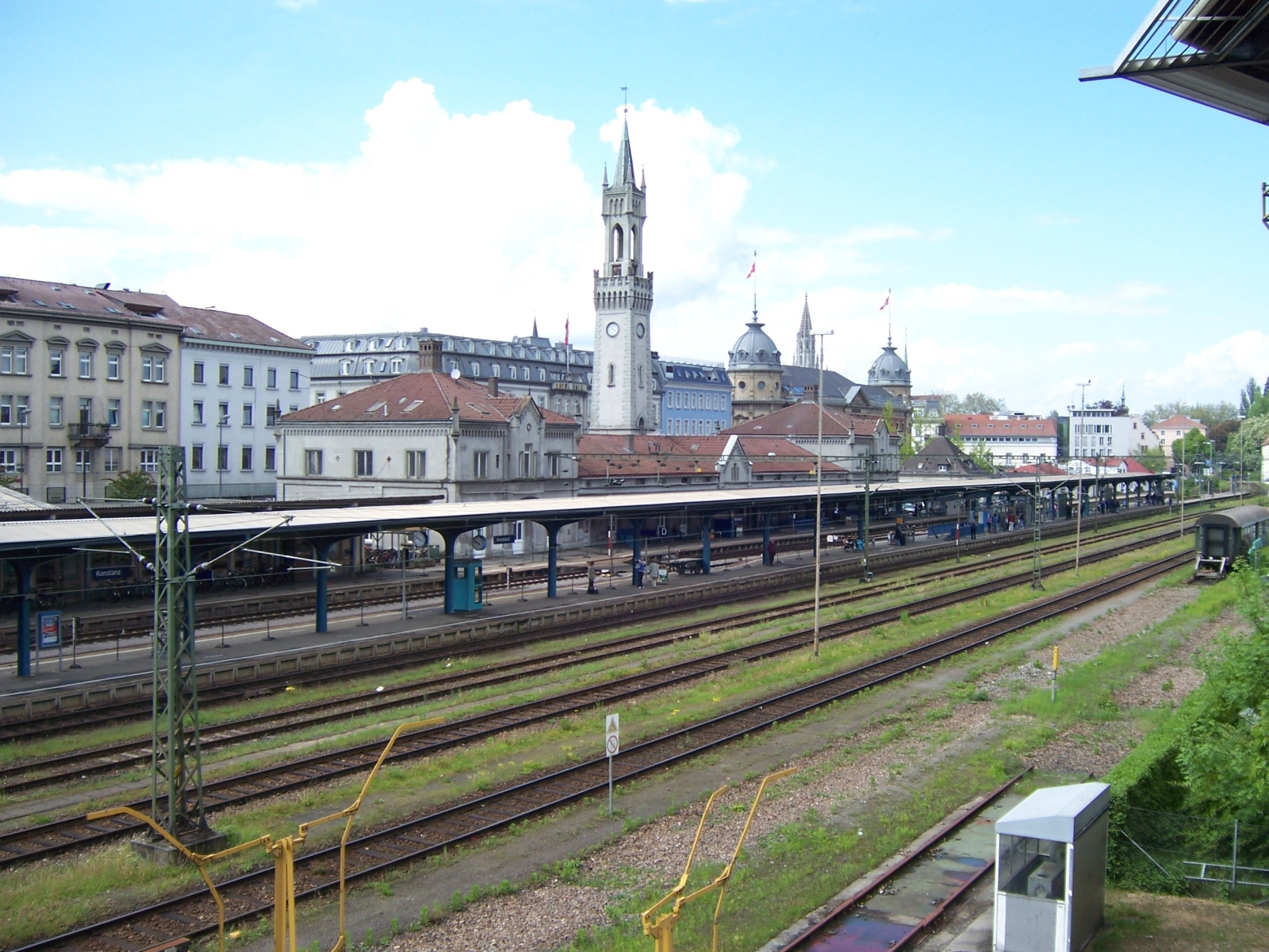 Hauptbahnhof Konstanz, Schienengelände